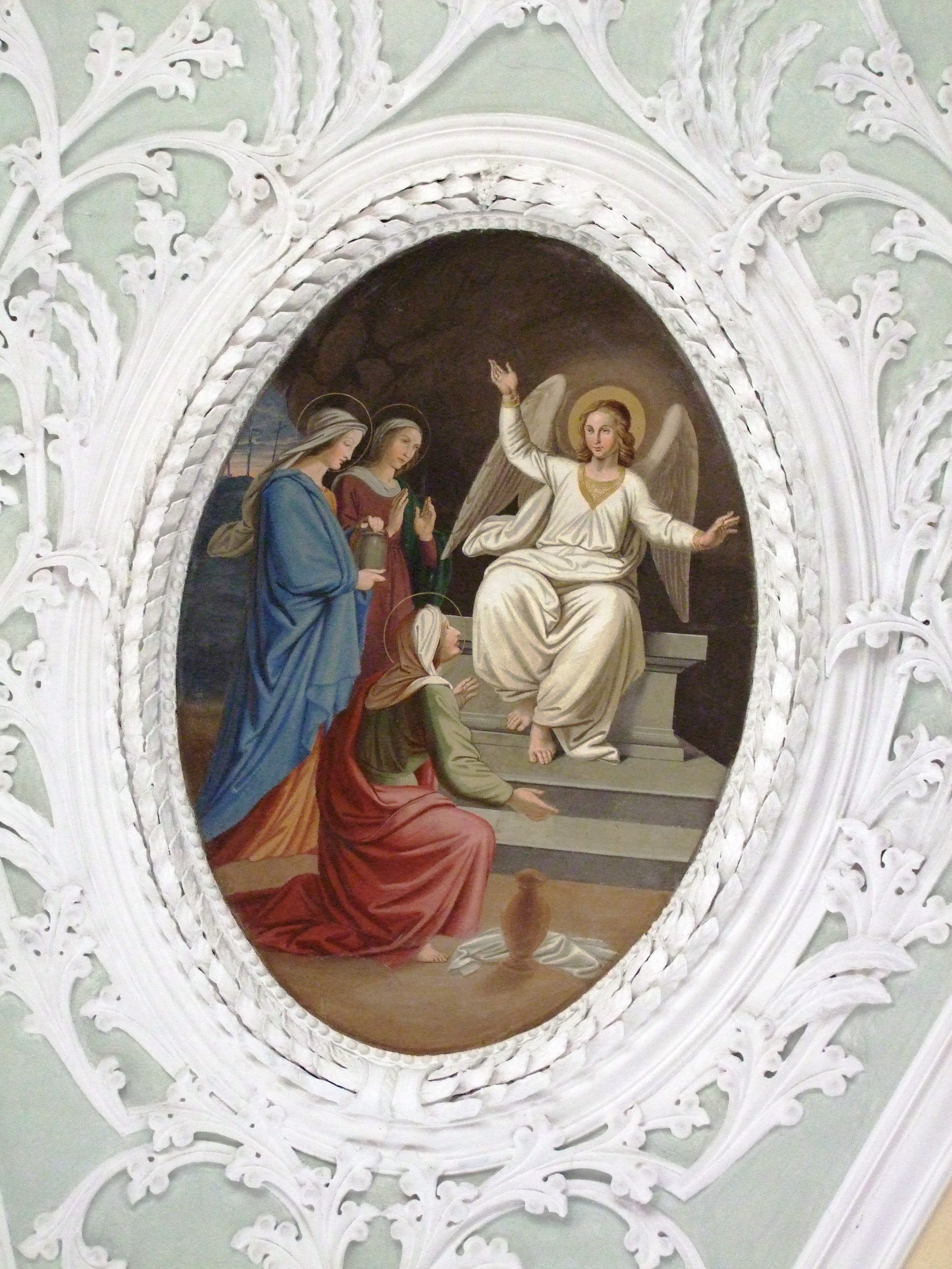 St. Martin im oberschwäbischen Boos bei Memmingen.